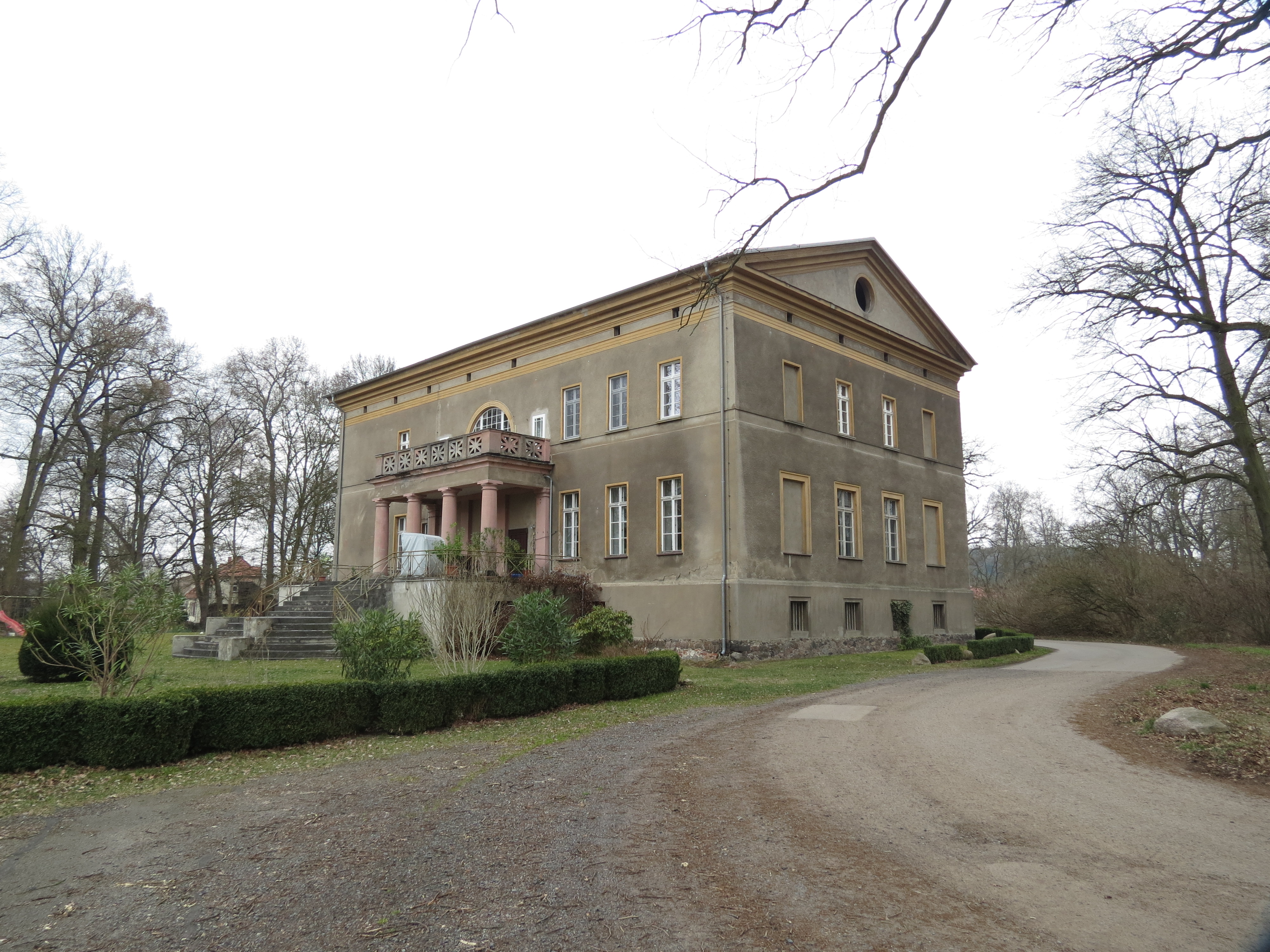 Gutshaus Pretschen, Nordostseite, Gemeinde Märkische Heide, Lkr. Oder-Spree, Brandenburg, Deutschland.